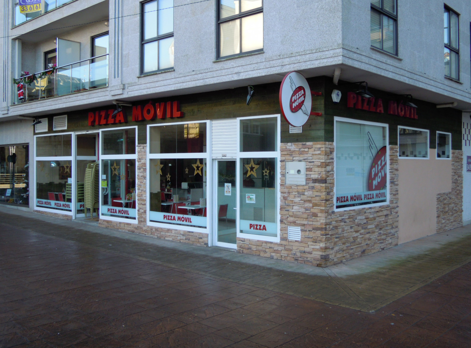 Establecemento de Pizza Móvil na rúa Cando do Porriño